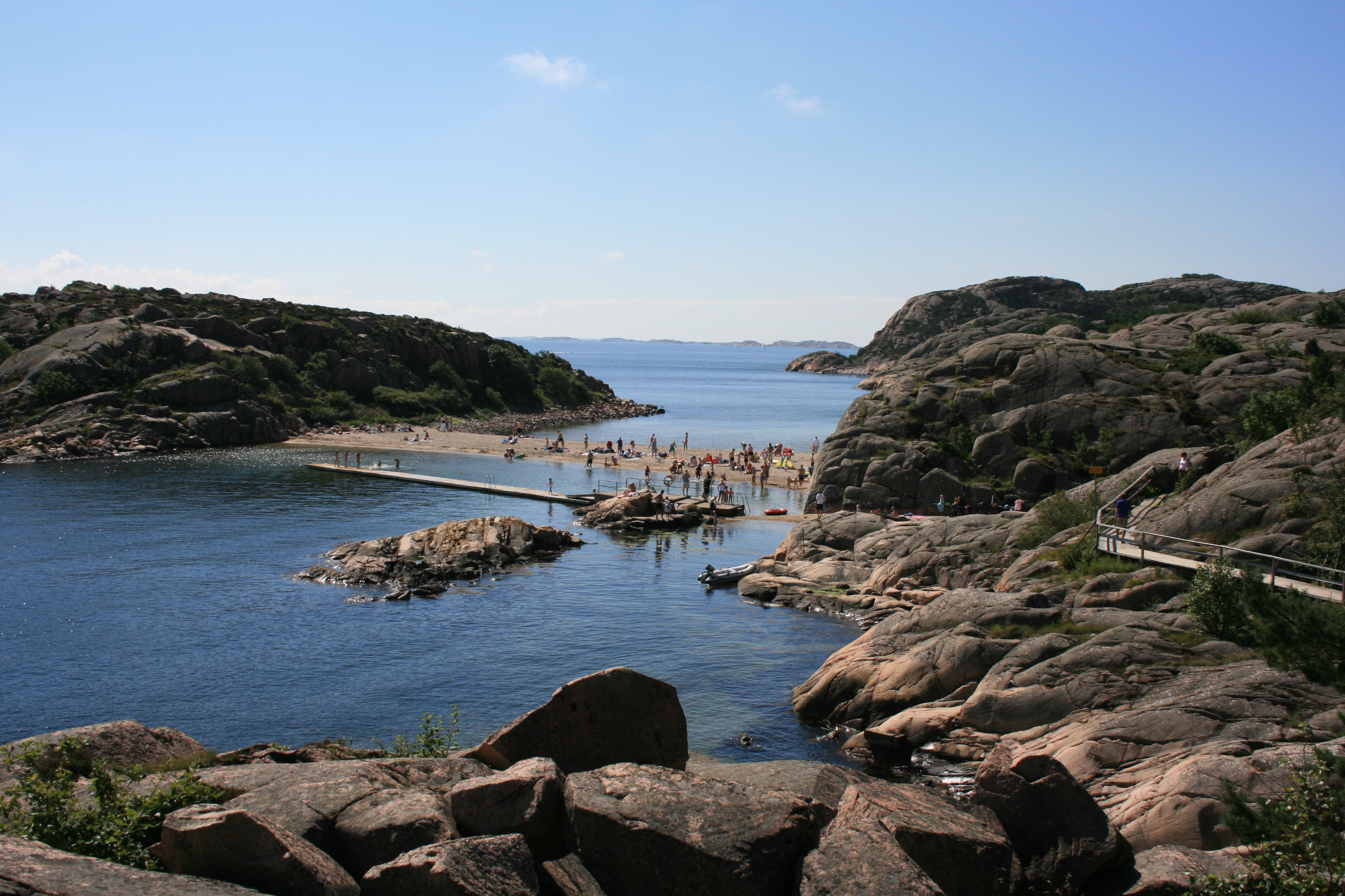 Bild på en badstranden "Pärlane" på Malmön